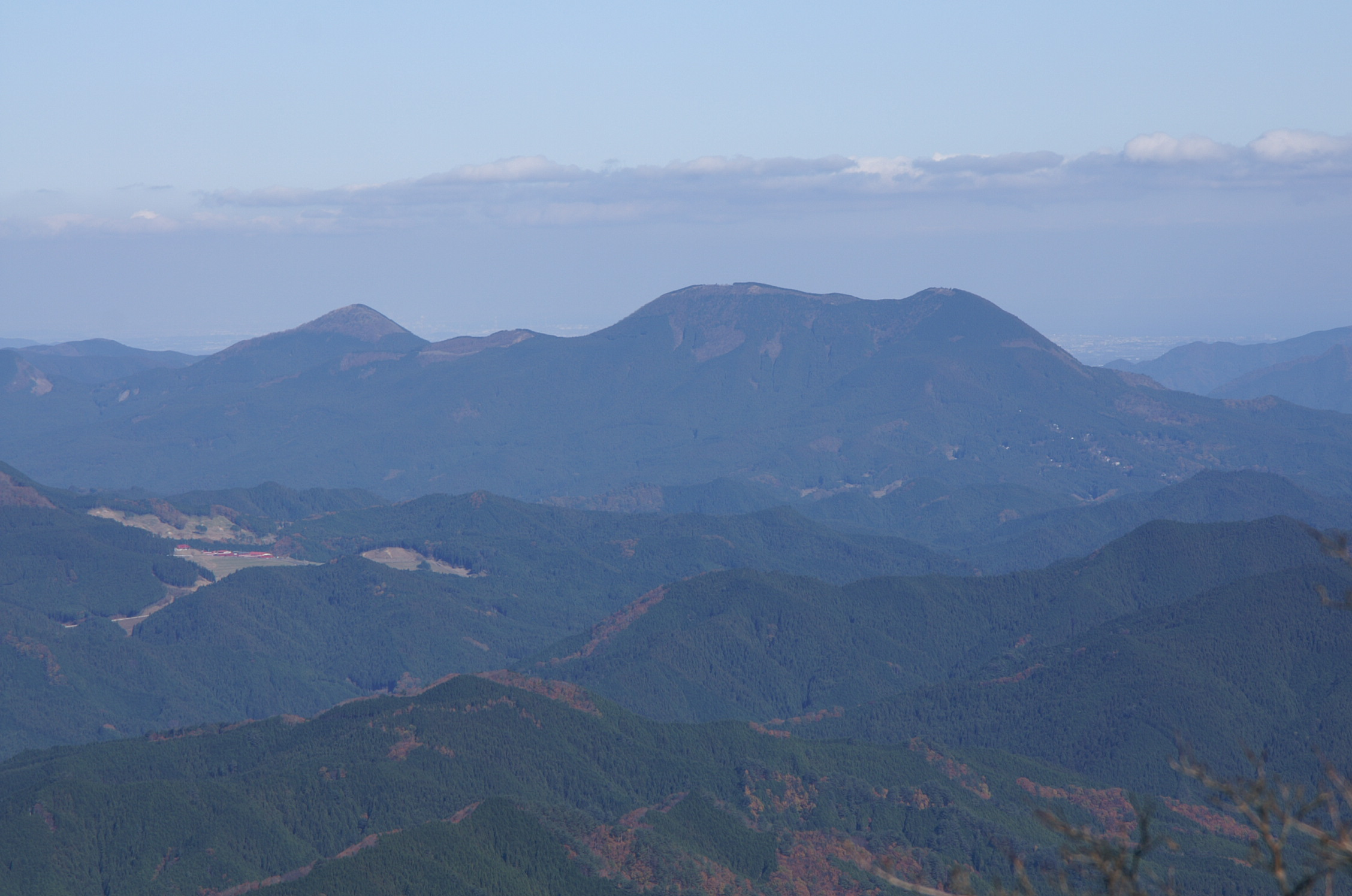 高見山から見た大洞山（右）と尼ヶ岳（左）。